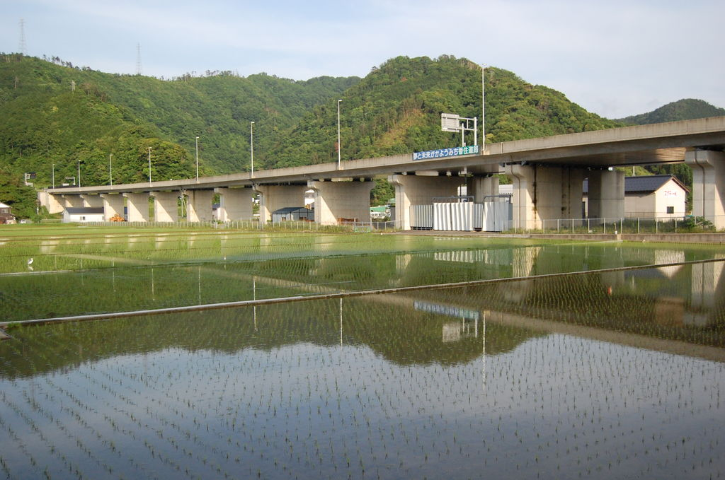 香住道路。香住高架橋。